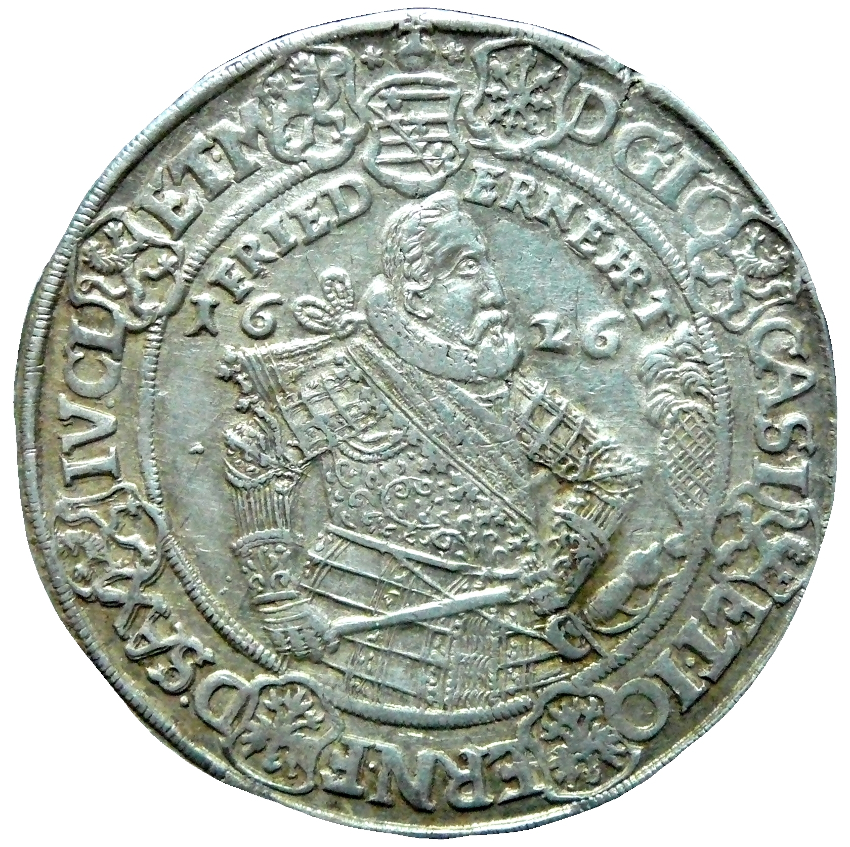 Gemeinsame Münzprägung 1596-1633 Johann Casimir Herzog von Sachsen-Coburg und Johann Ernst Herzog von Sachsen-Eisenach Eintrachtstaler mit Spruch: "FRIED ERNEHRT -VNFRIED VERZEHRT" 1626 Münzstätte Saalfeld, Münzmeister Wolf Albrecht der Jüngere Reichstaler im Reichsmünzfuß: Ag 888,89‰ Feingewicht: 25,984 g Gewicht: 29,232 g Durchmesser: 43,95-44,22 mm Dicke: 2,42 mm